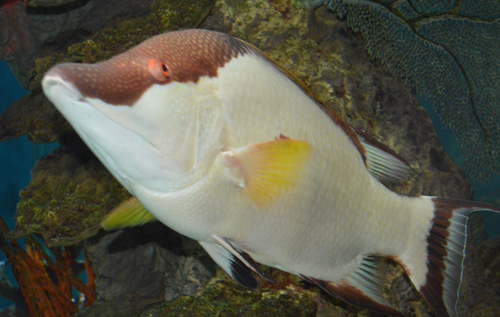 Lachnolaimus maximus